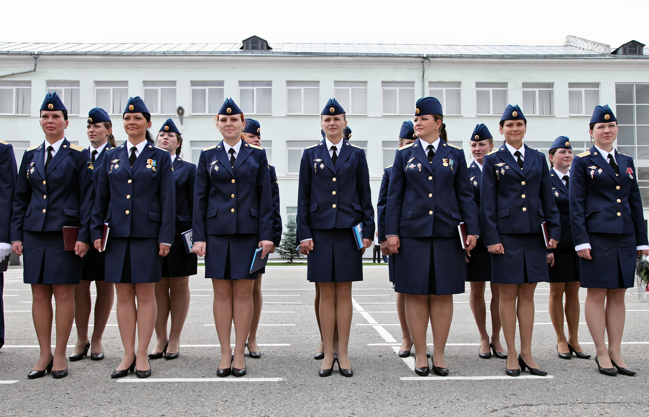 Я конечно больше внимания уделил девушкам. К сожалению, не успел сфотографировать вручение дипломов у других (Of course I concentrated mainly on female lieutenants)